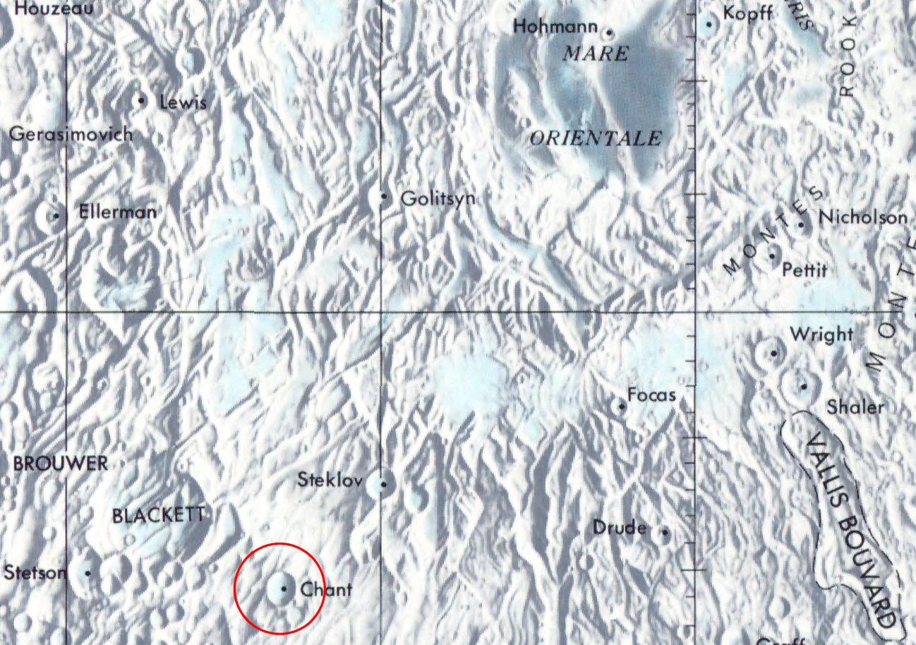 Cráter Chant. Localización (Mapa Lunar NASA)